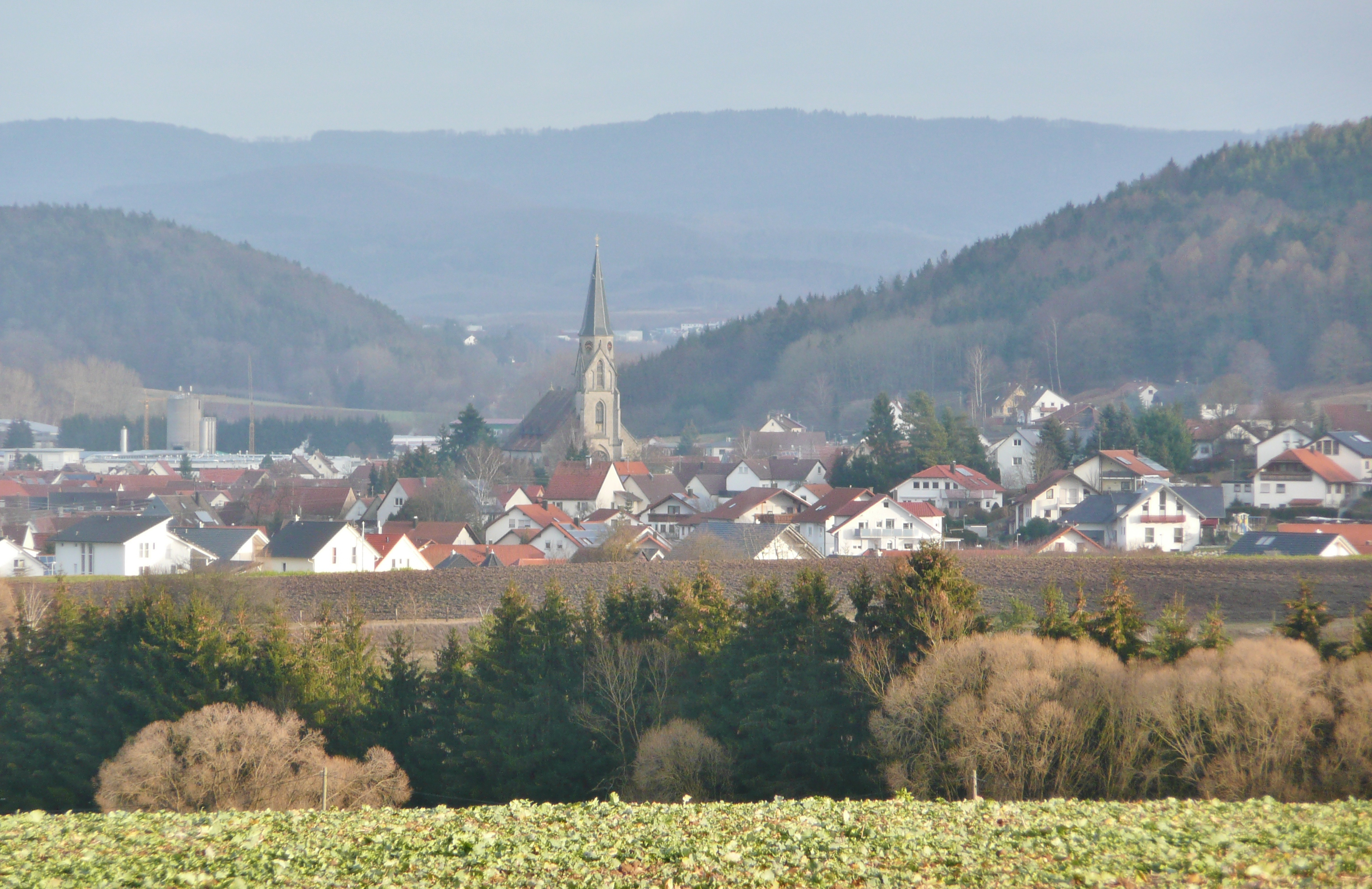 Rangendingen